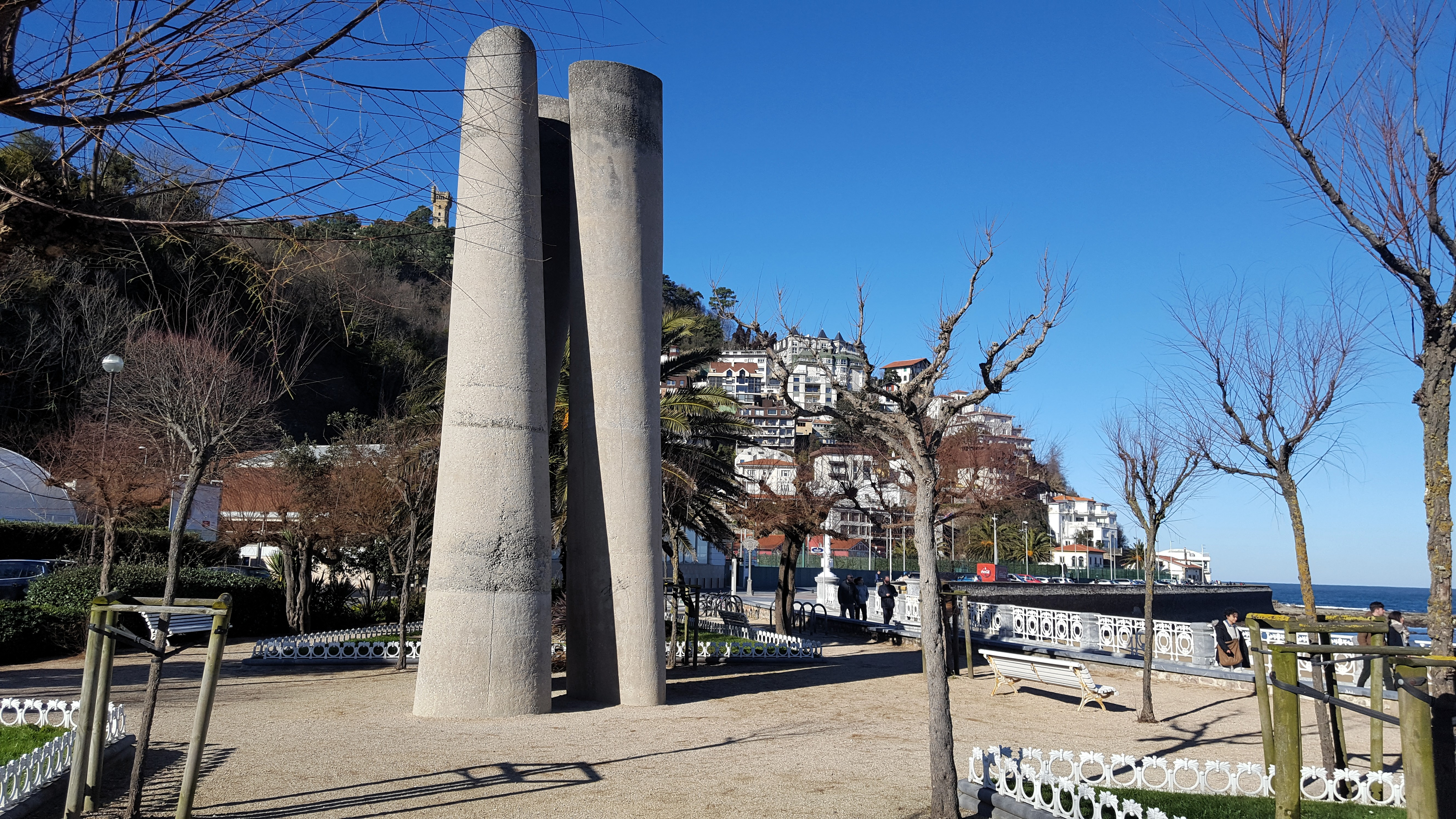 Zeharki eskultura Donostian, Ondarretako lorategian